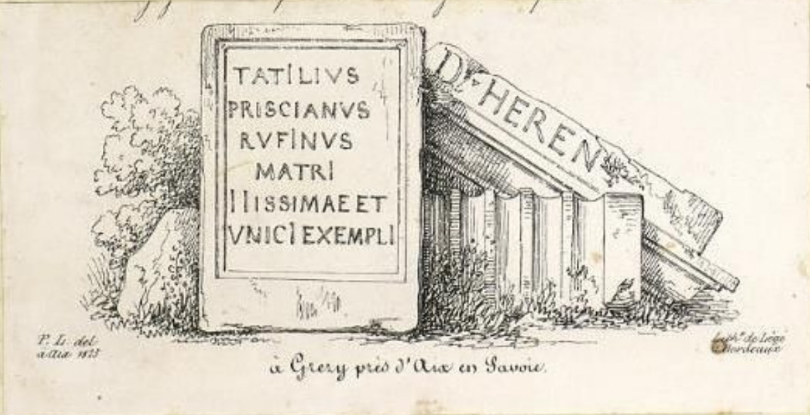 Pierre Lacour, Voyage en Italie 1824-1825, page 74 ː Inscription en latin près du château de Grézy (stèle funéraire de Tatilius Priscianus Rufinus à sa mère).